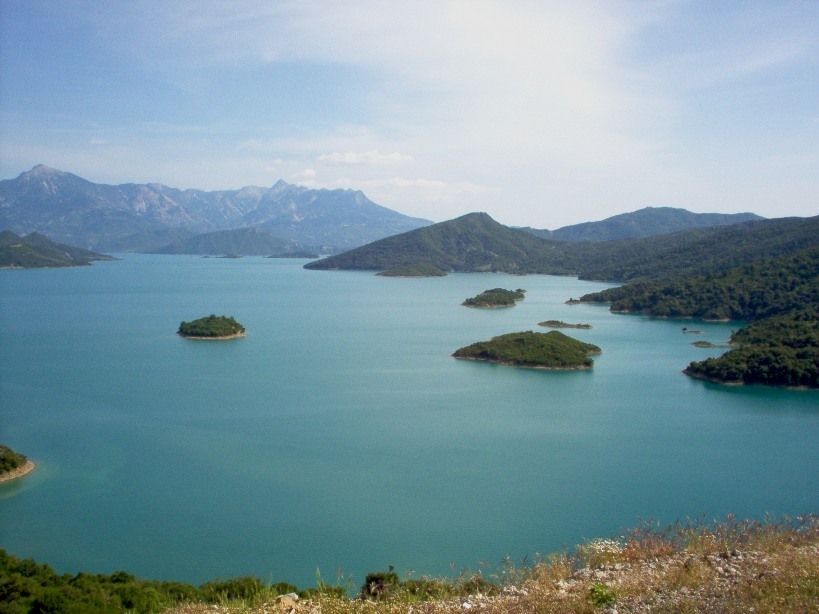 Krenasta lake